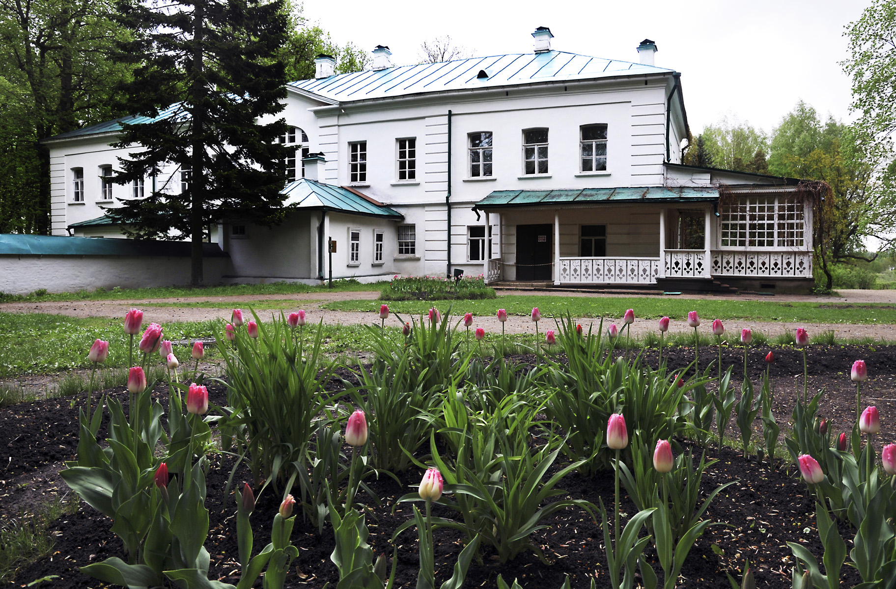 La casa museo di Lev Tolstoj nella tenuta di Jasnaja Poljana